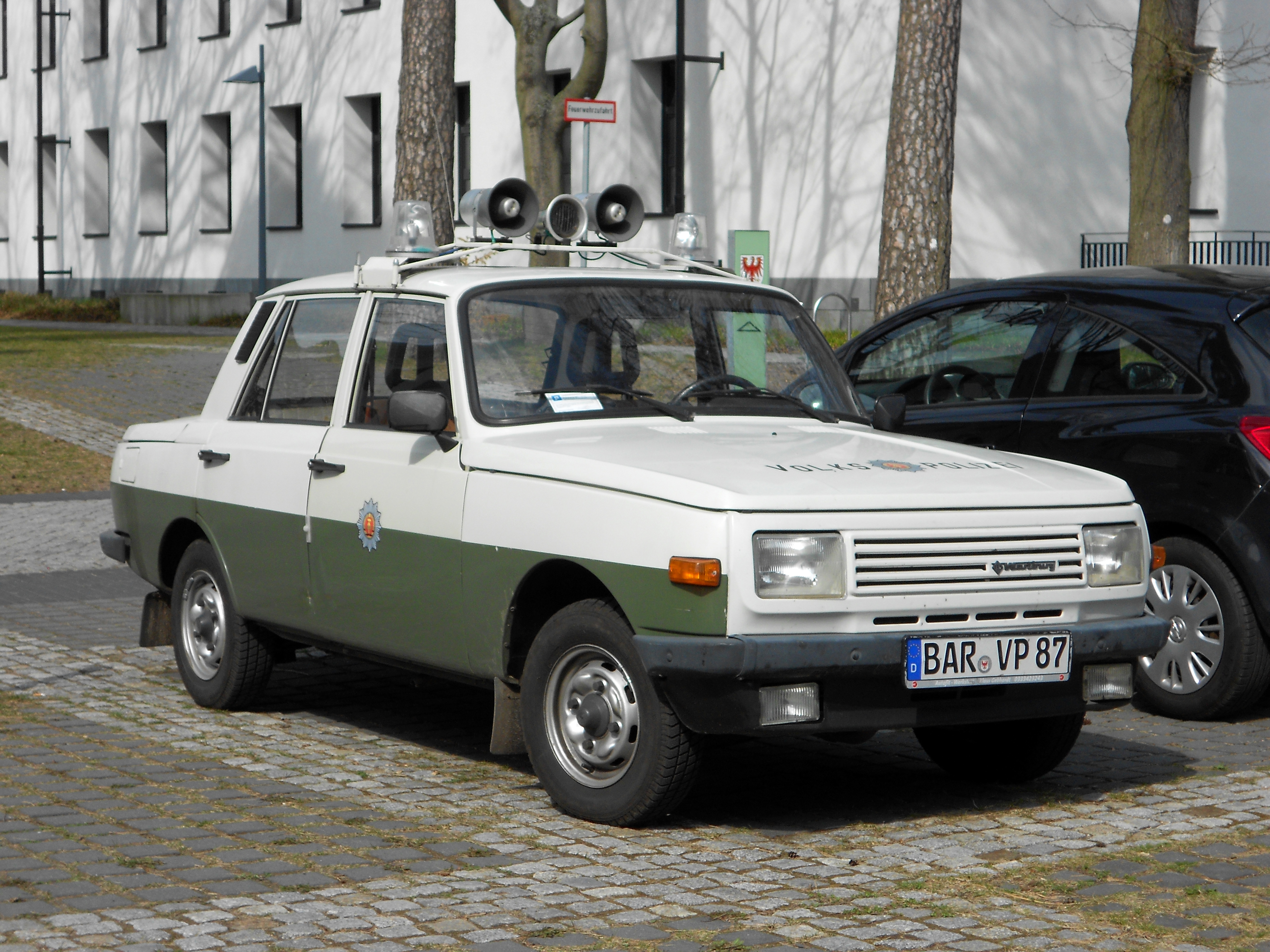 Eberswalde Südend, ehemalige Artilleriekaserne (bis 1945), sowjetische Kaserne (bis 1994), heute Landeskriminalamt, Finanzamt und andere Behörden